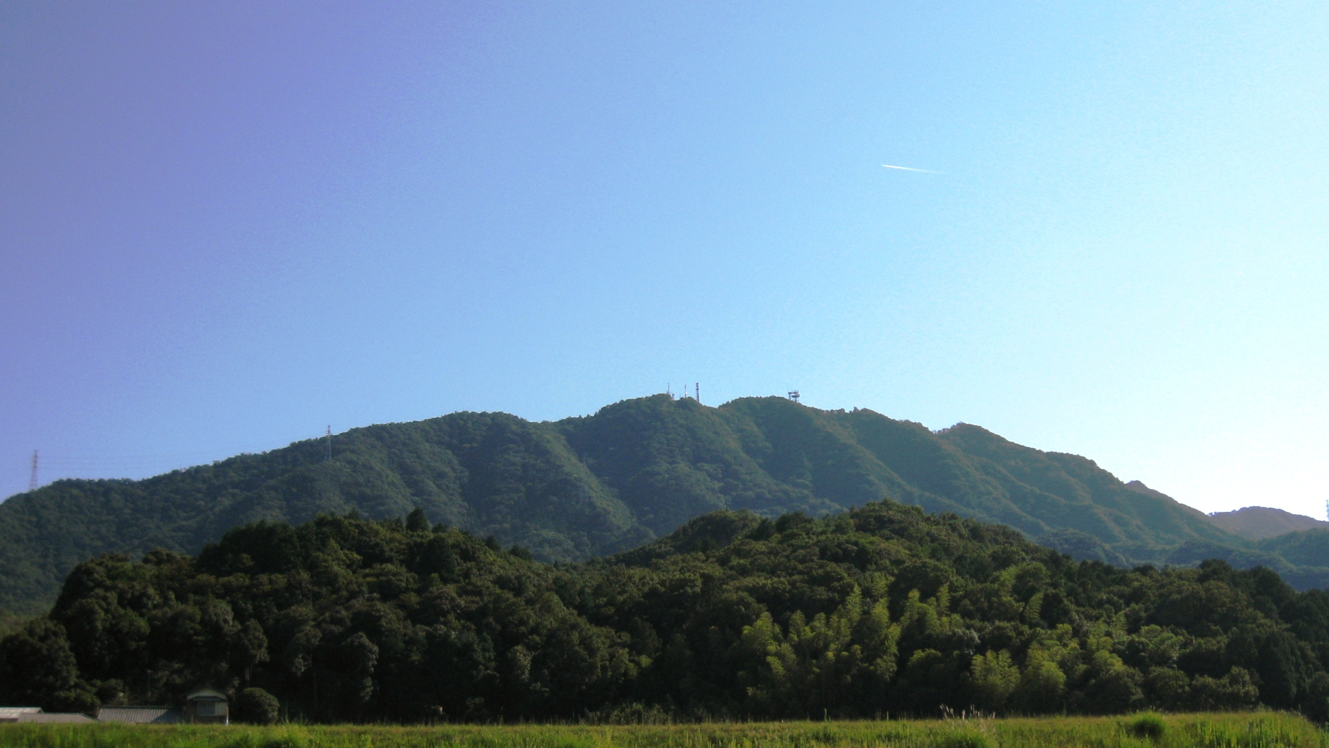 香川県東かがわ市にある高平山の全景。山頂にある電波塔は讃岐白鳥テレビジョン中継局など。